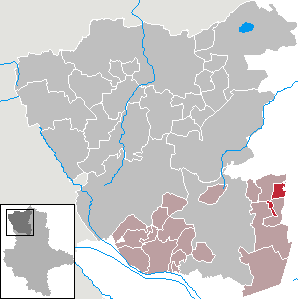 (Original text: Seethen im Landkreis Salzwedel)